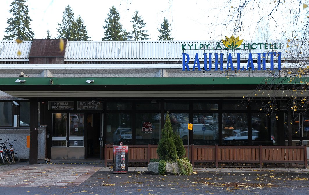 Rauhalahti on kylpylähotelli ja matkailukeskus Kuopion Leväsen kaupunginosassa. Kylpylähotellin katuosoite on Katiskaniementie 8.